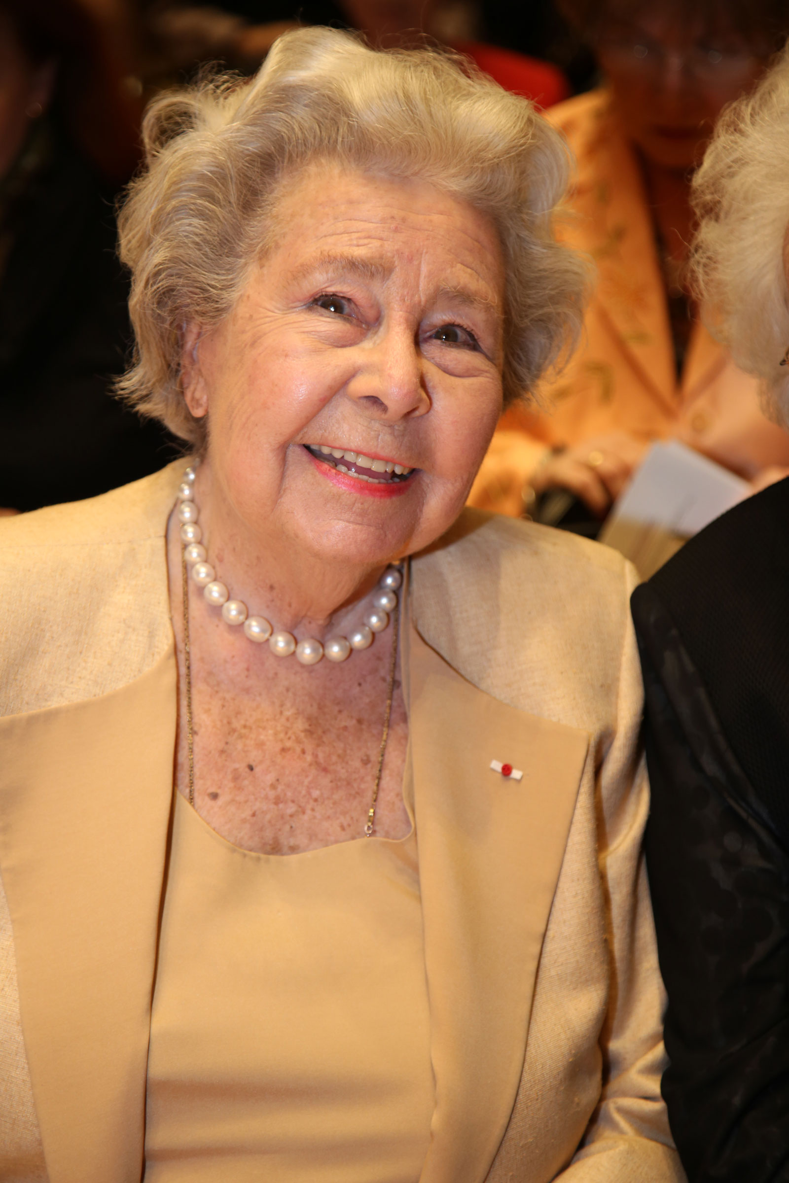 KS Christa Ludwig, geboren am 16. März 1928 in Berlin, deutsche Opern- und Konzertsängerin (Mezzosopran) wurde zur Ehrenpräsidentin der Hilde Zadek Stiftung ernannt.